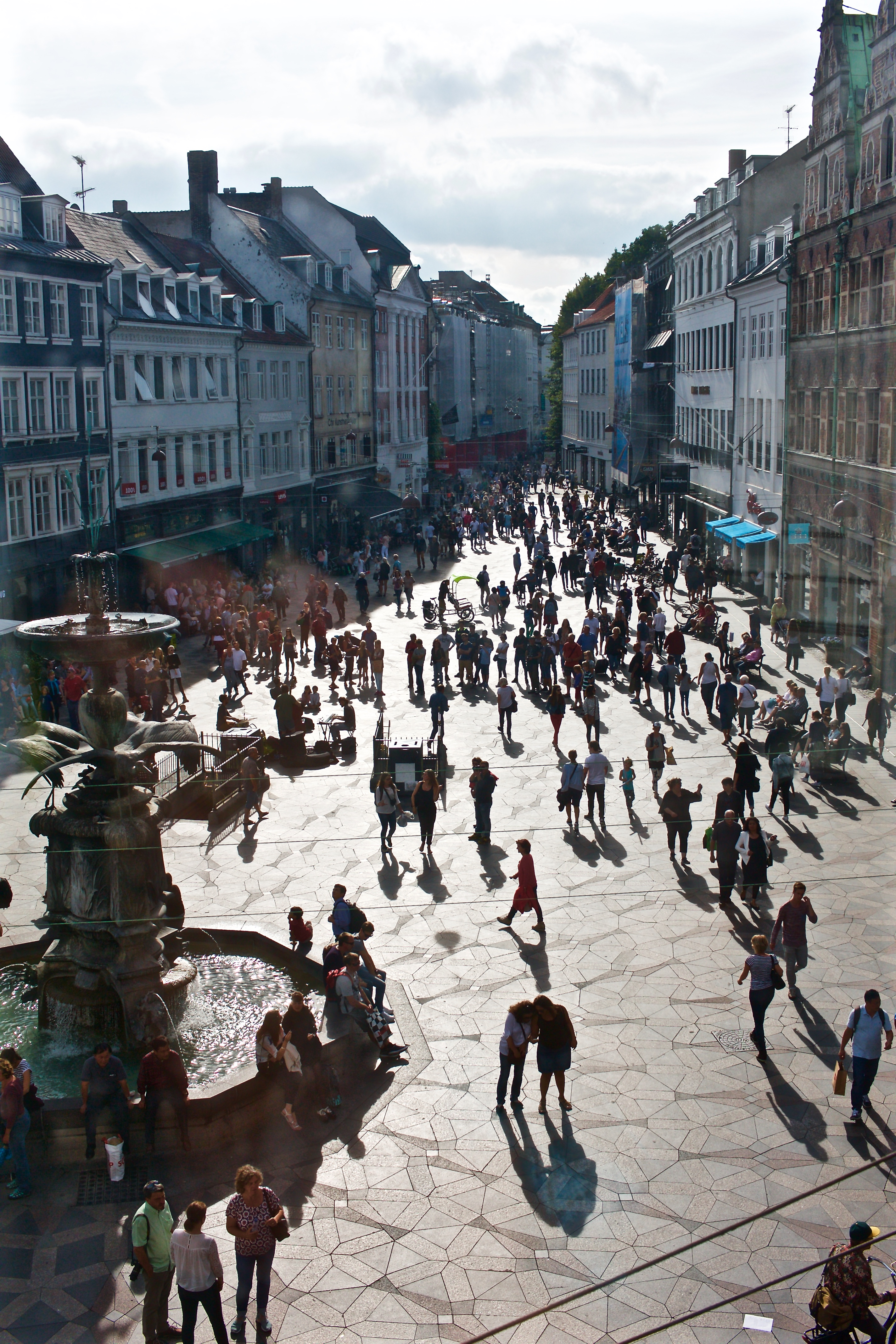 Amagertrov from Hay's flagship store in Højbrohus in Copenhagen, Denmark